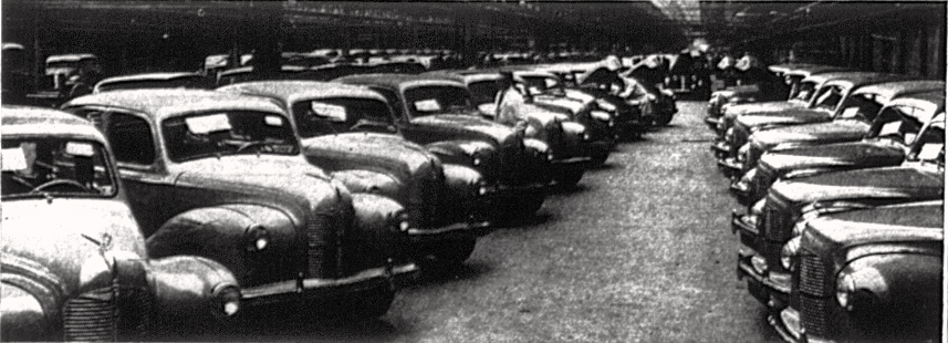 Auto de la compagnie Austin de Birmingham en 1948